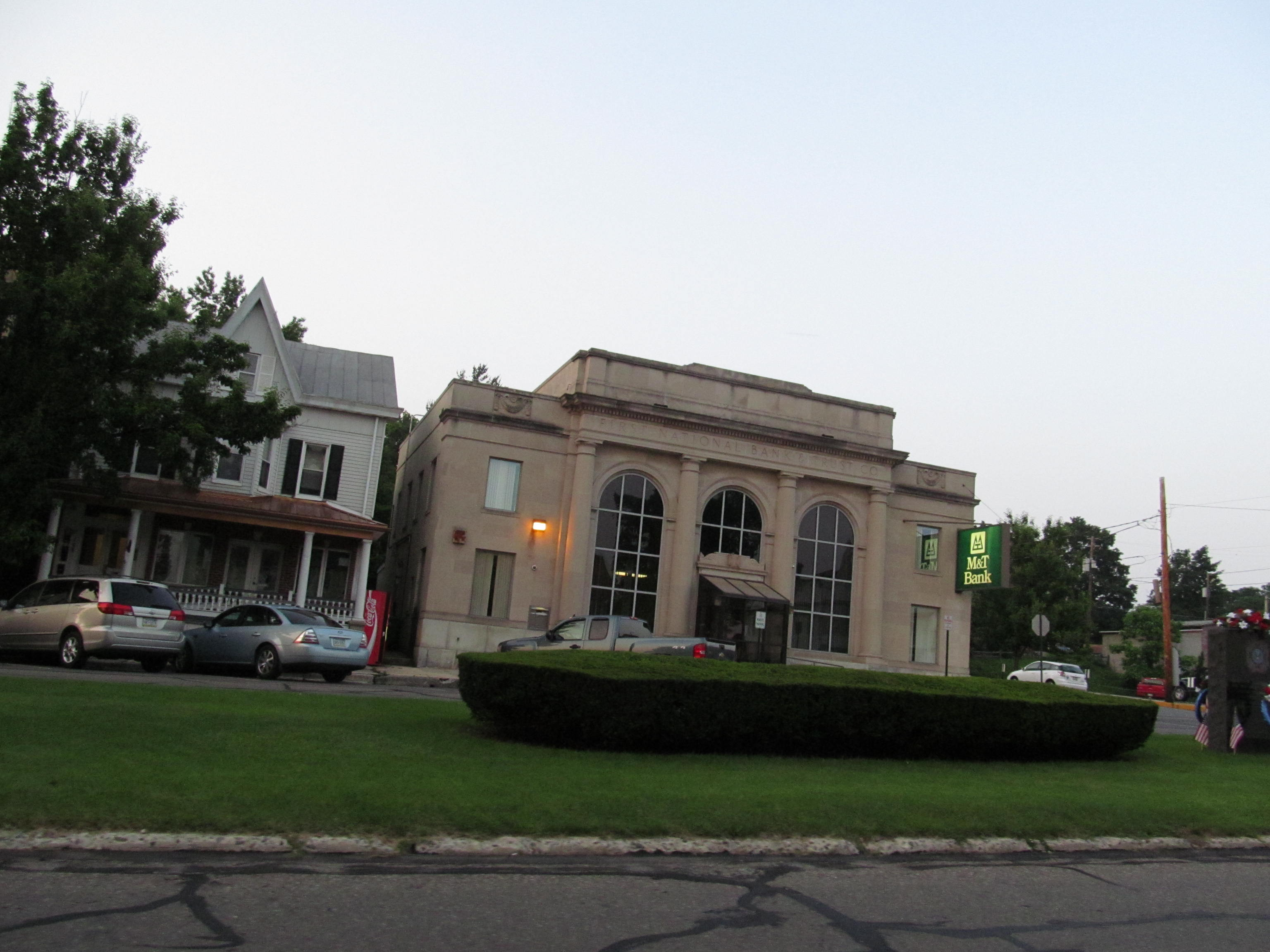 Orwigsburg, Pennsylvania